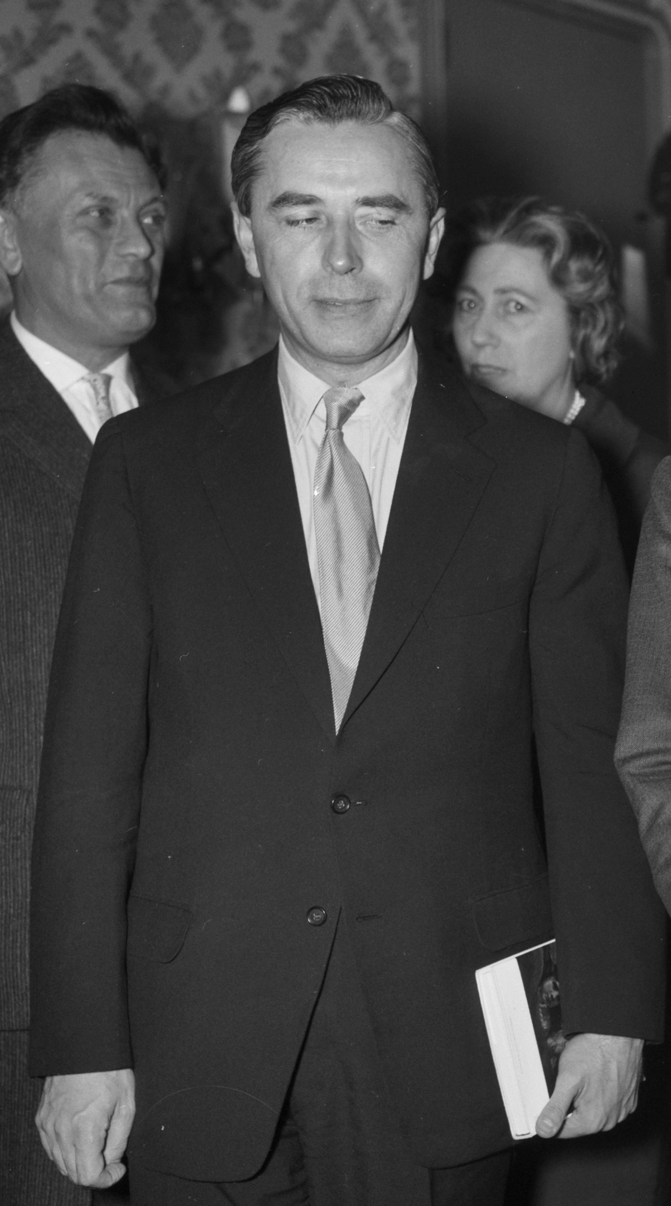 Drie beroemde pianisten bijeen in een NCRV interview in het Amstelhotel: Rudolf Firkusny Datum